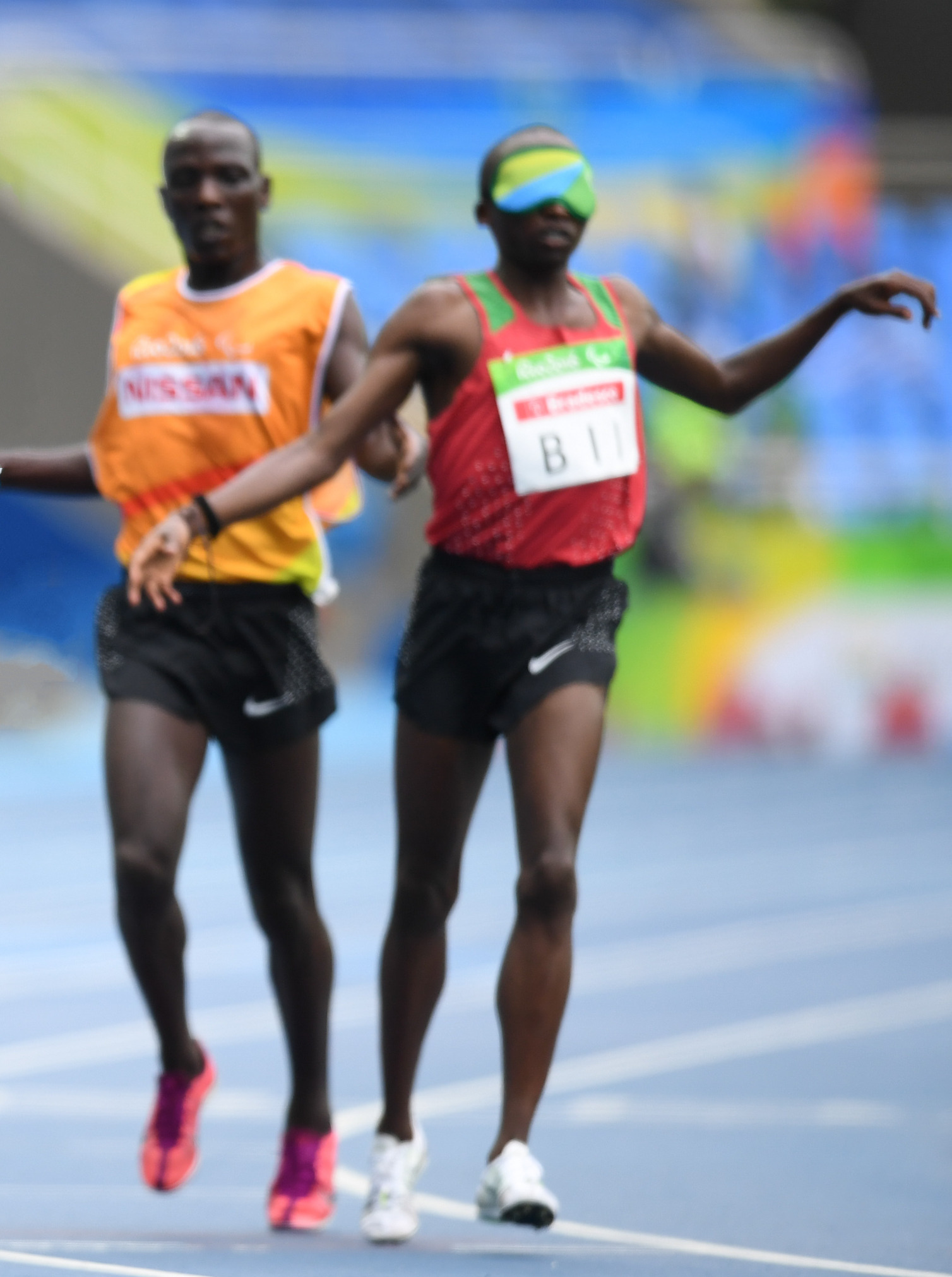 Rio de Janeiro - O brasileiro Odair Santos, 35 anos, conquistou a primeira medalha brasileira nos Jogos Paralímpicos Rio 2016. Ele ficou em segundo lugar nos 5000 metros rasos (Tânia Rêgo/Agência Brasil)